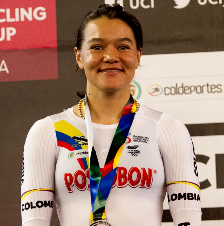 Martha Bayona plata en Keirin en la Copa Mundo de Pista - Cali 2017